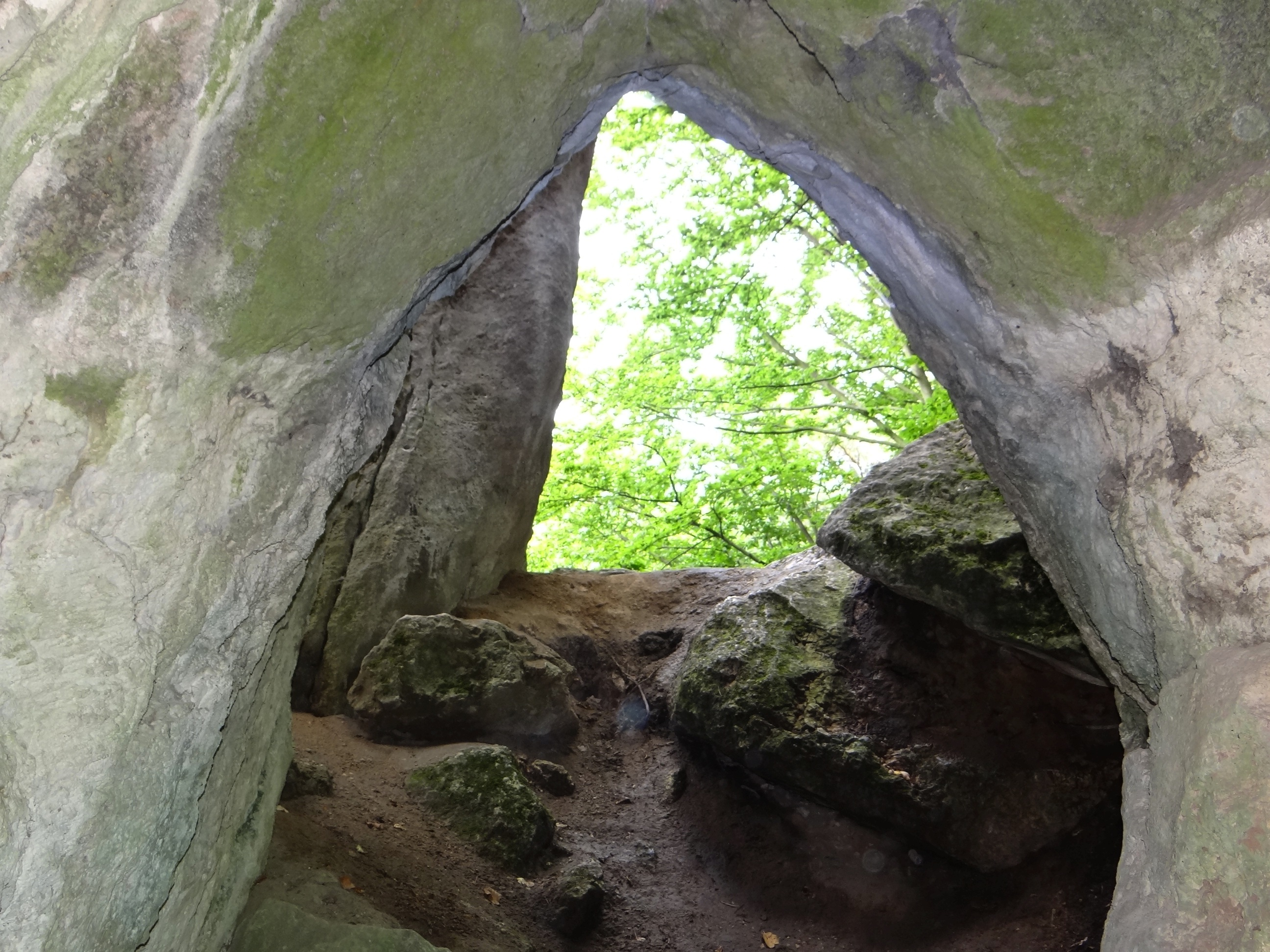 Schronisko w Krużganku na Górze Popielowej w na Wyżynie Częstochowskiej